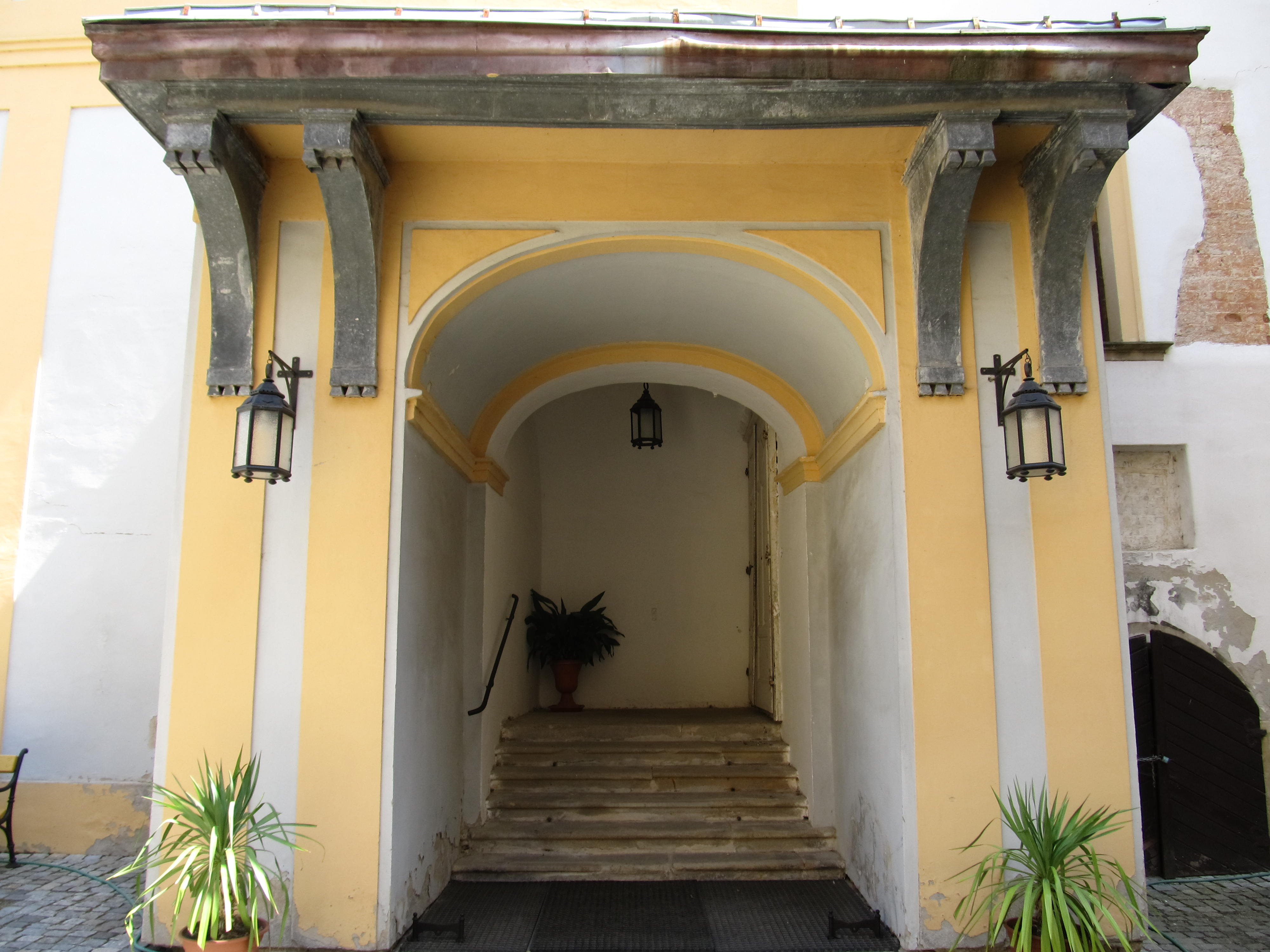 Tovačov zámek